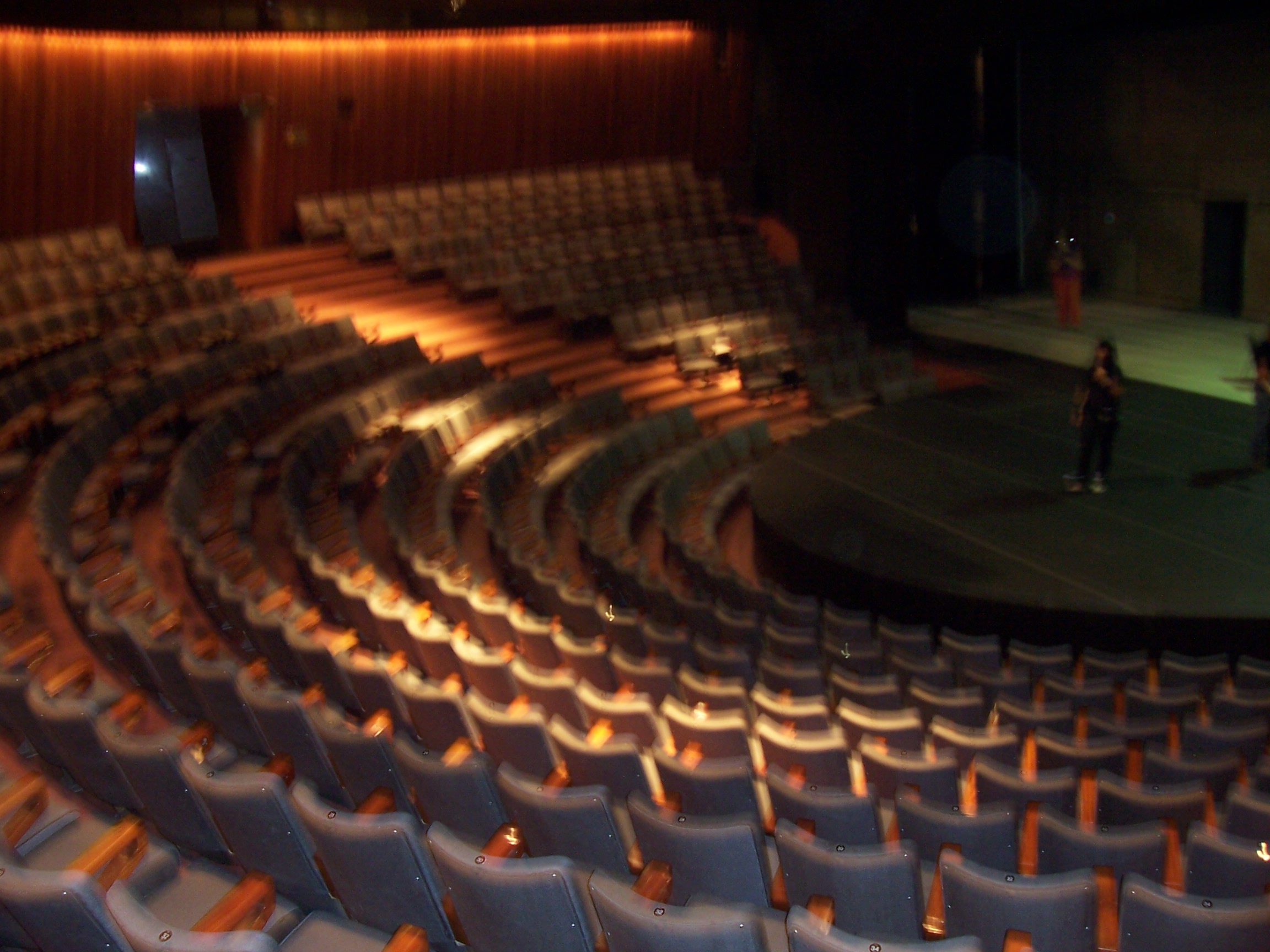 Interior del Teatro San Martín. Buenos Aires, Argentina.